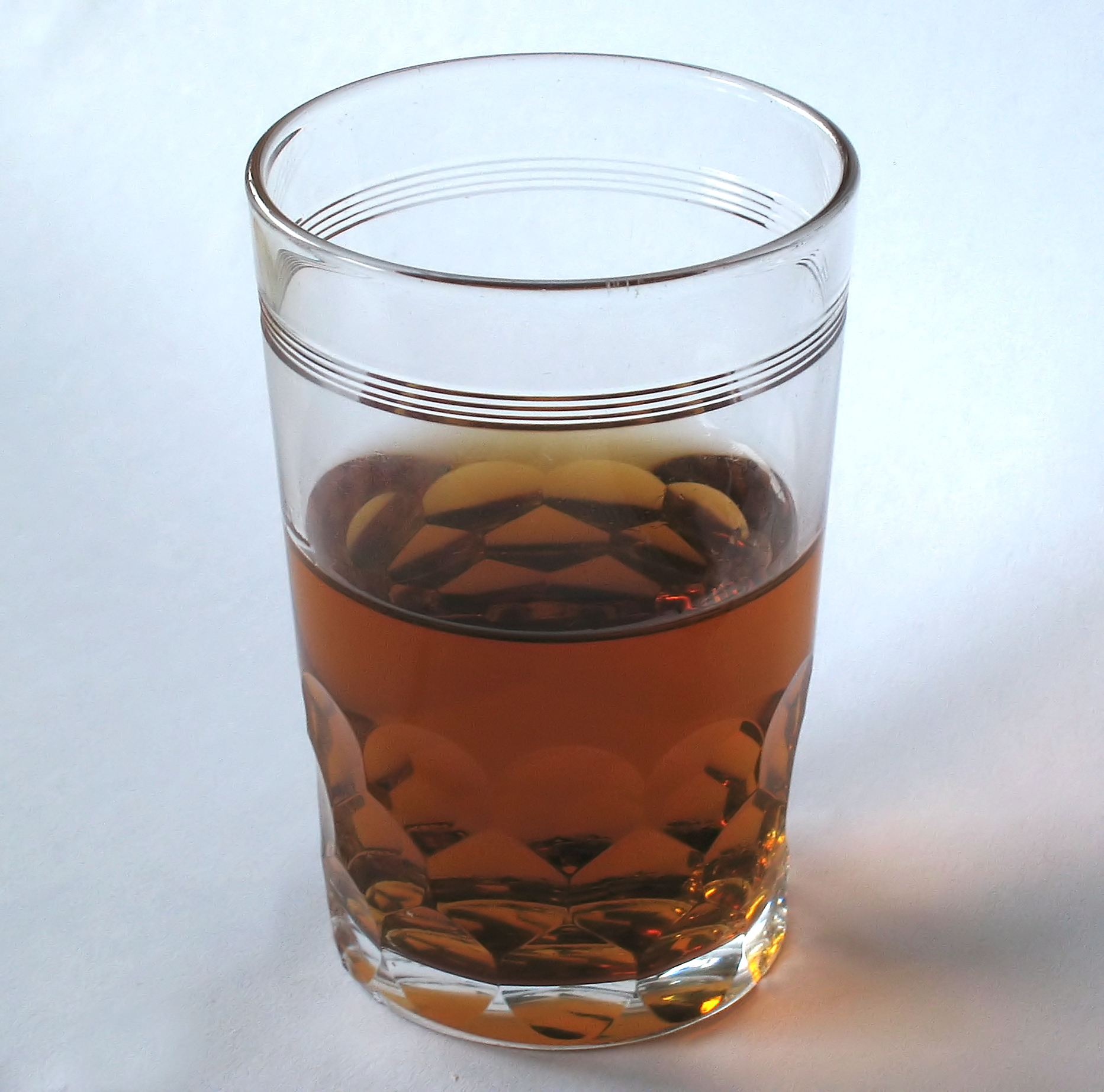 altes französisches Weinprobenglas, 0,1 l